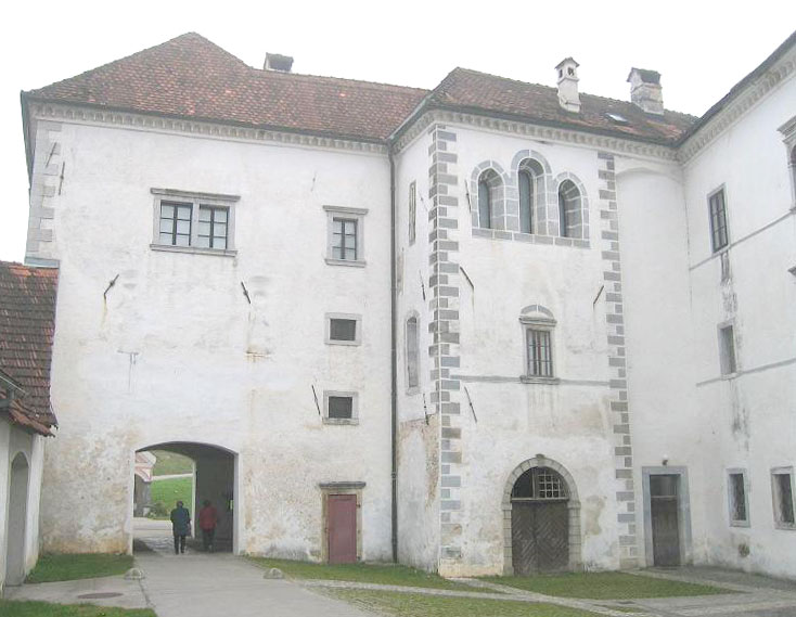 Monastery Sittich, Slovenia / samostan Stična, Slovenija / Kloster Sittich, Slowenien